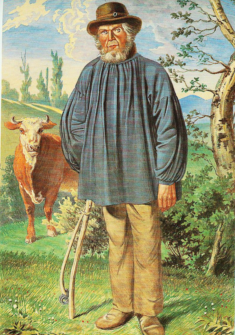 Scan einer Abbildung, Arbeitstracht eines Kuhhirten, Wommelshausen